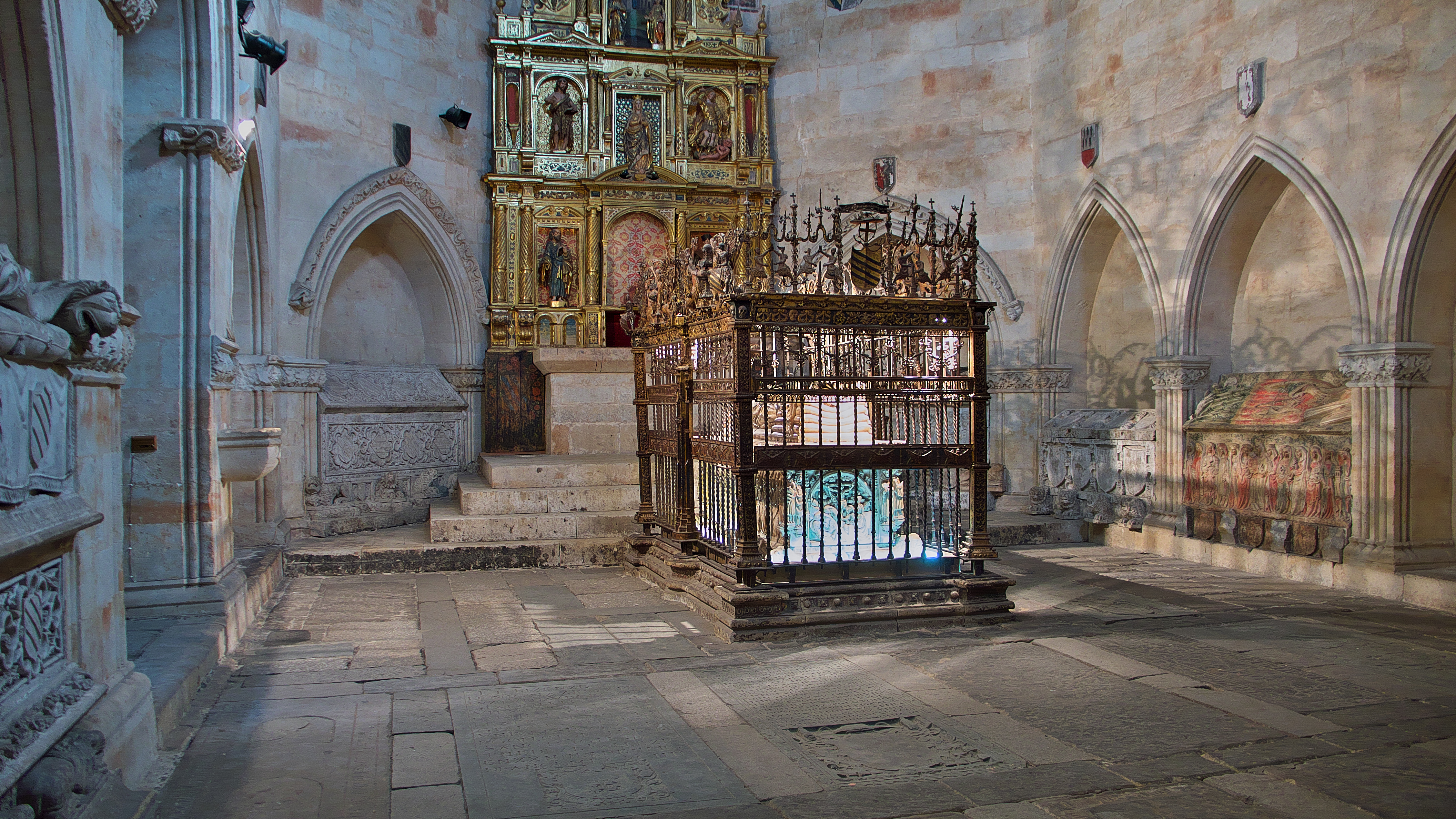 También llamada de San Bartolomé (1442). La joya es el sepulcro del obispo Diego de Anaya Maldonado.